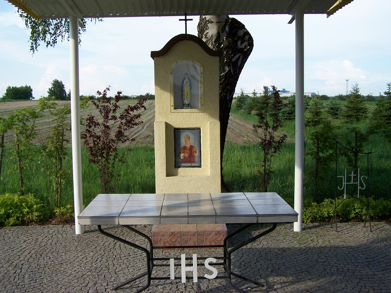 Kapliczka